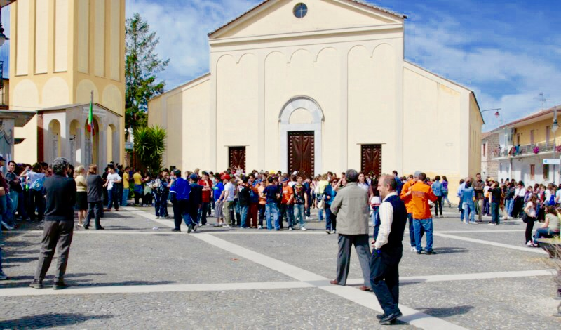 Piazza Europa smlf